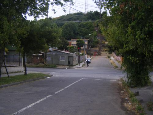 Camilo Henriquez con Diego de Oro, Sector Chillancito. Concepcion.